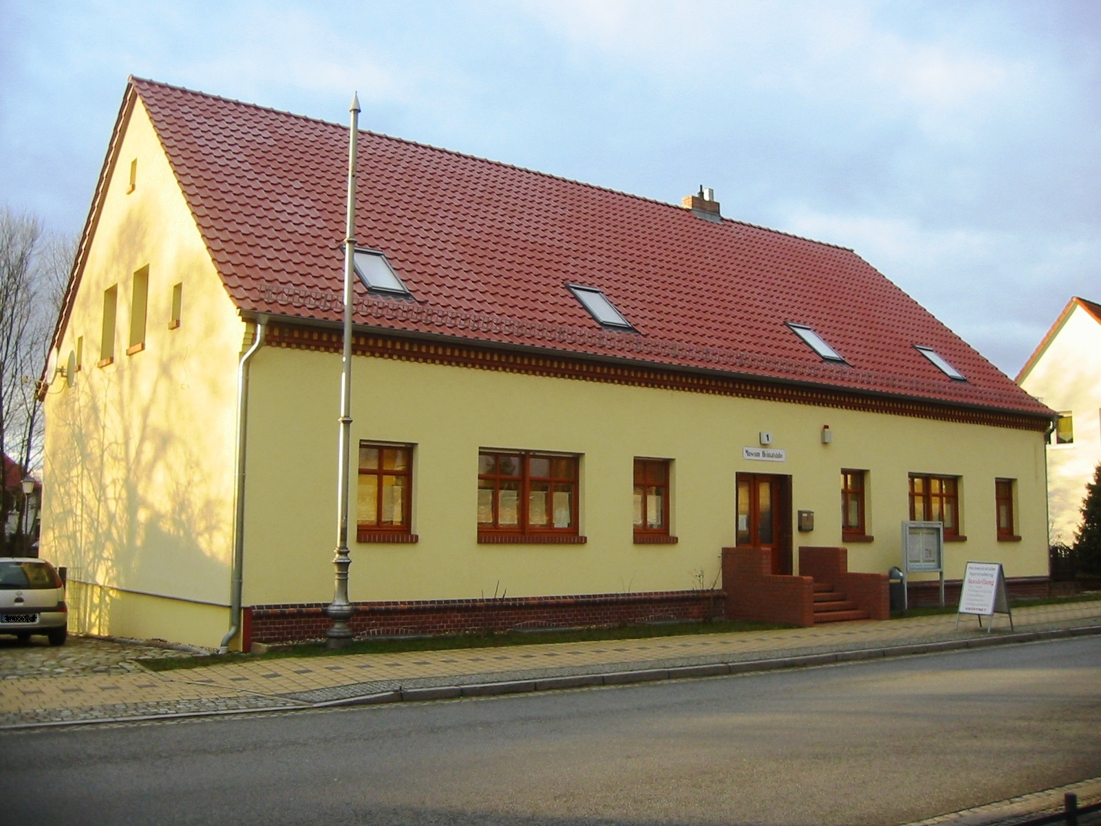 Heimatmuseum in der ehemaligen Schule in Sperenberg, Am Mellensee (Teltow-Fläming, Brandenburg)